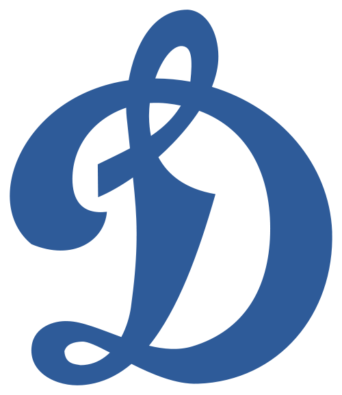 Логотип ОХК Динамо Москва